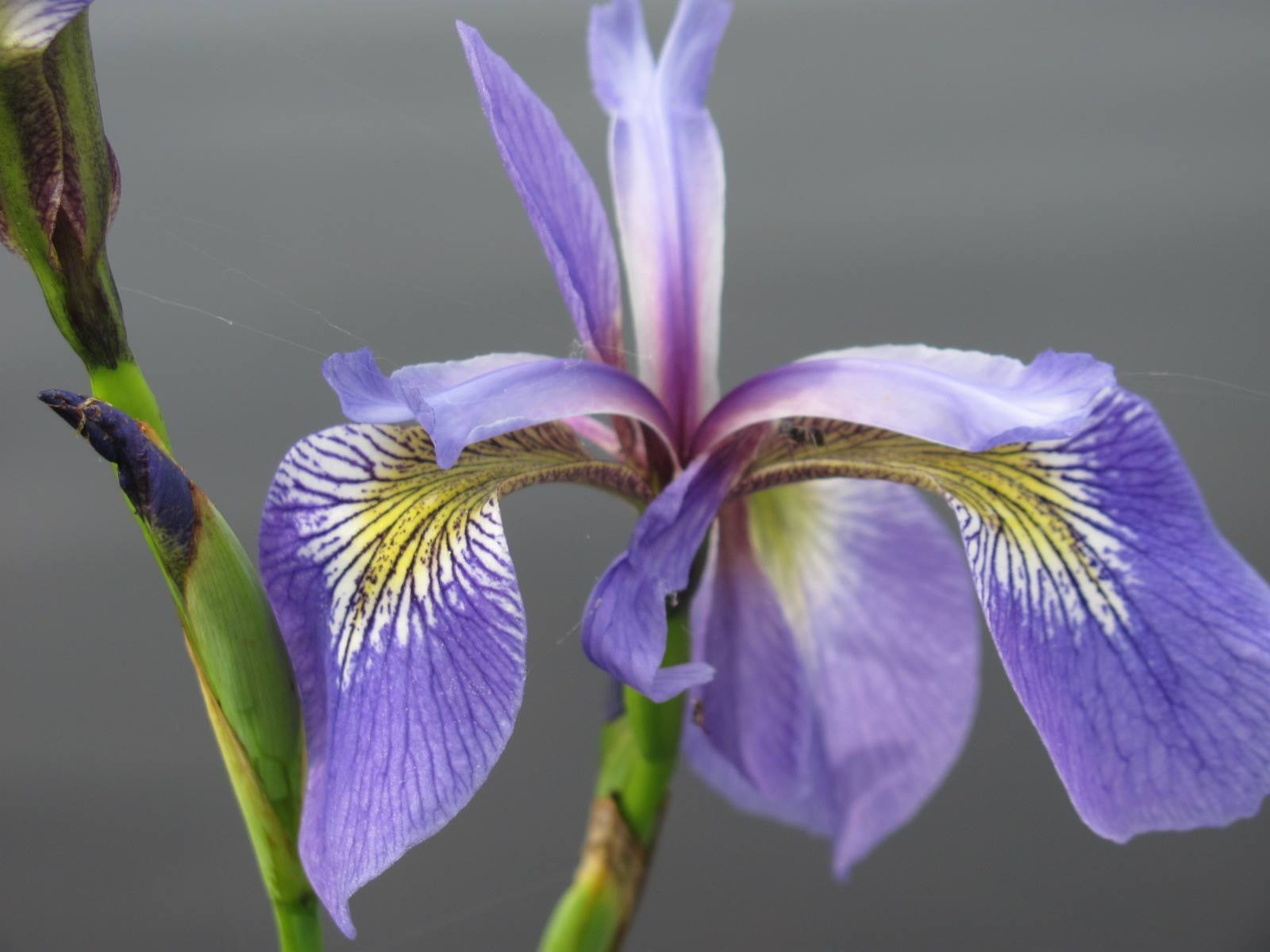 Emblème de la municipalité de Sainte-Félicité de L'Islet